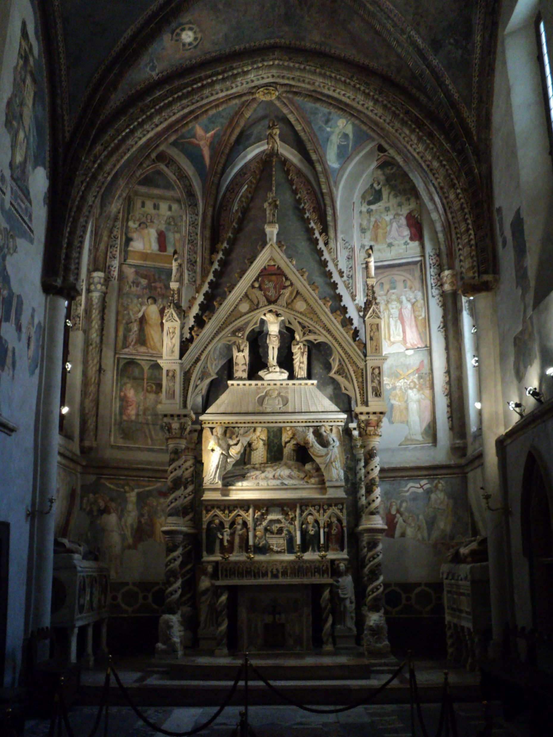 Duomo di Napoli - Cappella Capece di Minutolo (Napoli)